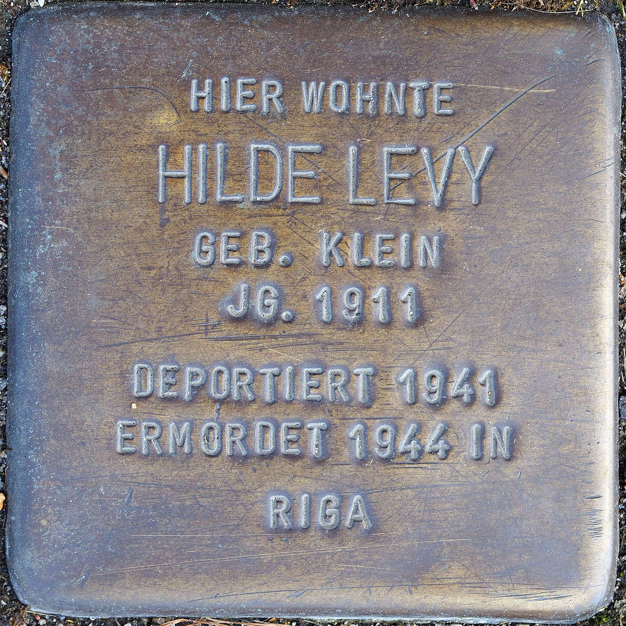 Stolpersteine Korschenbroich: Levy, Hilde